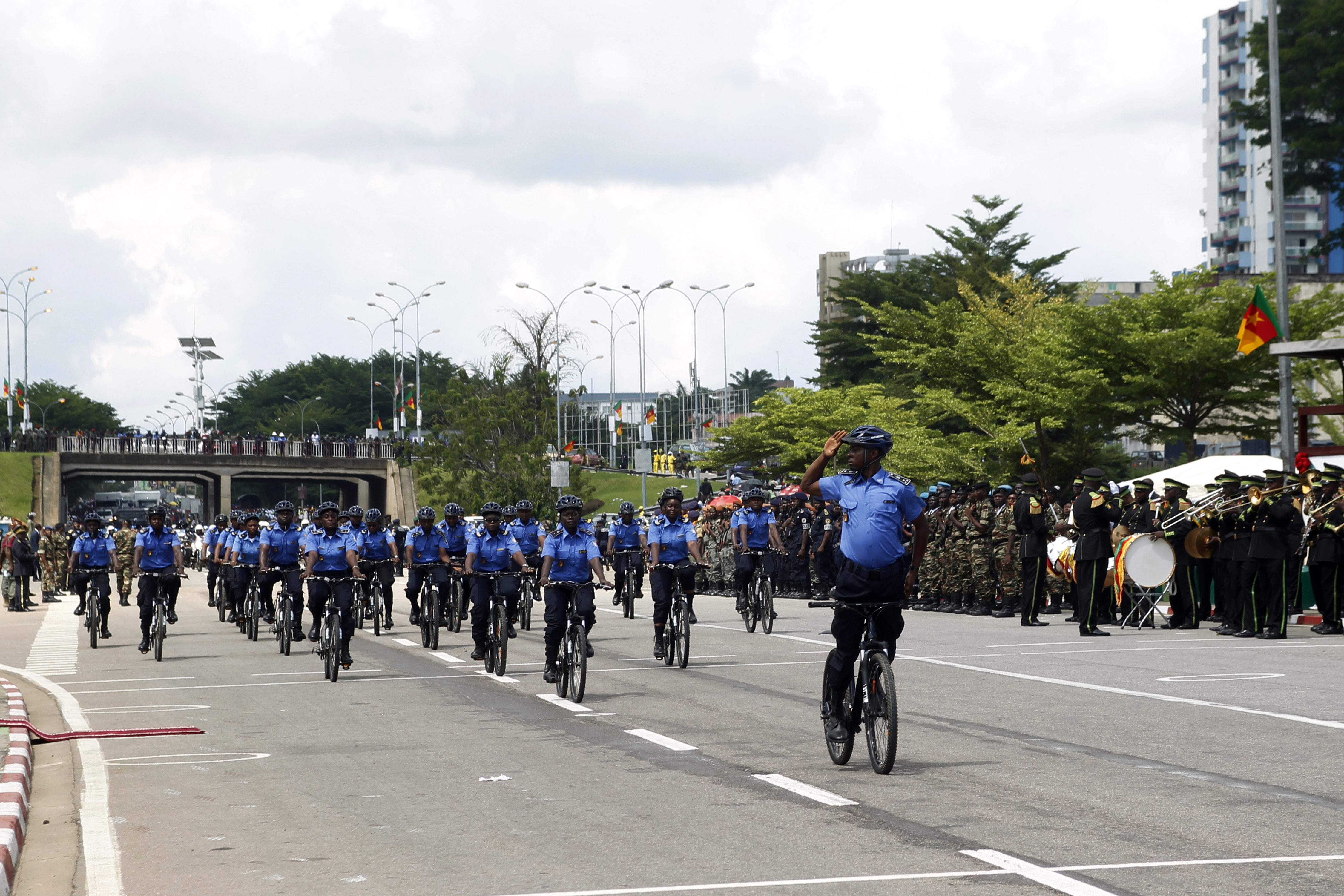 Défilé de la police camerounaise sur vélo lors de la fête national du Cameroun le 20 mai 2019 à Douala.